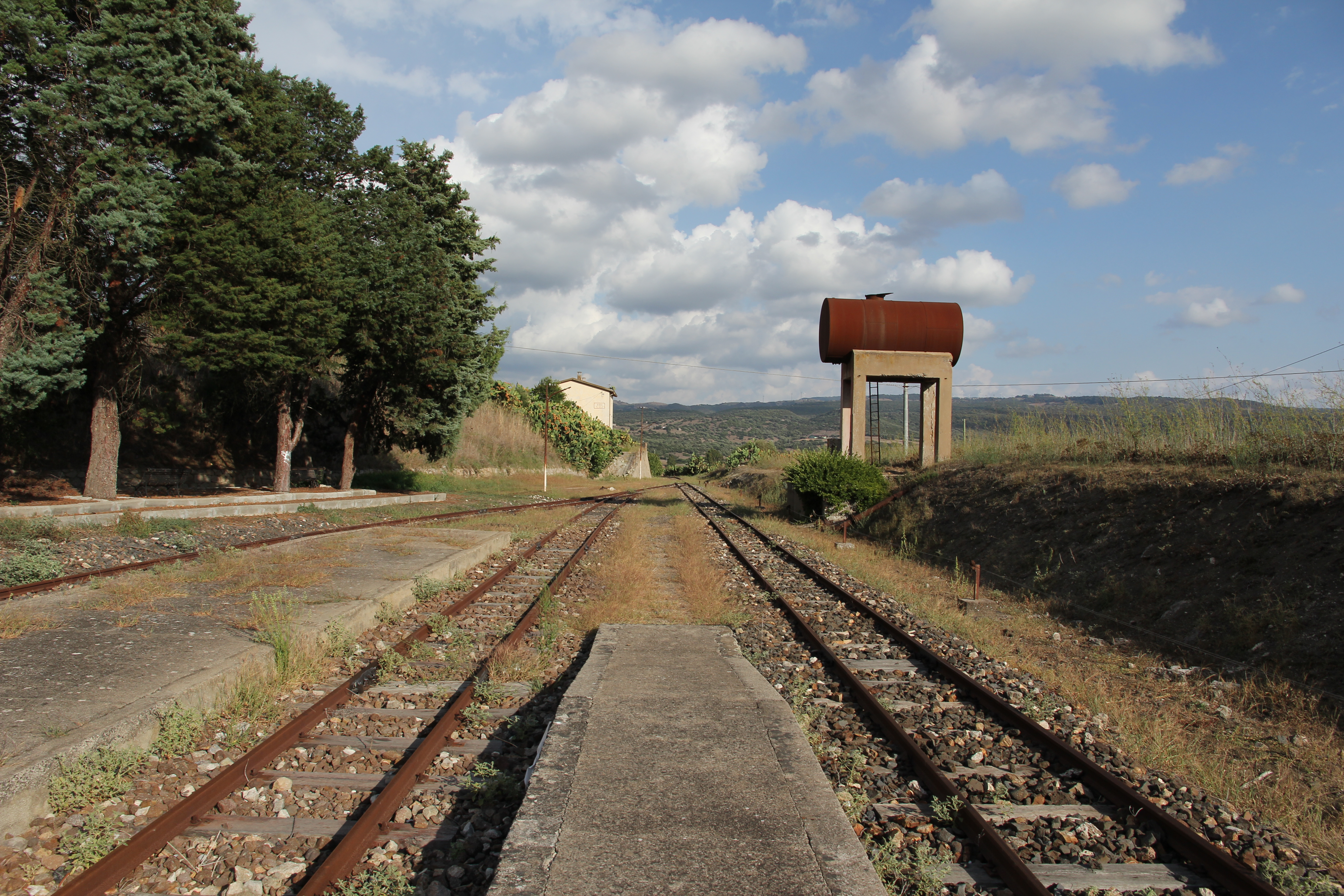 Perfugas - Stazione ferroviaria